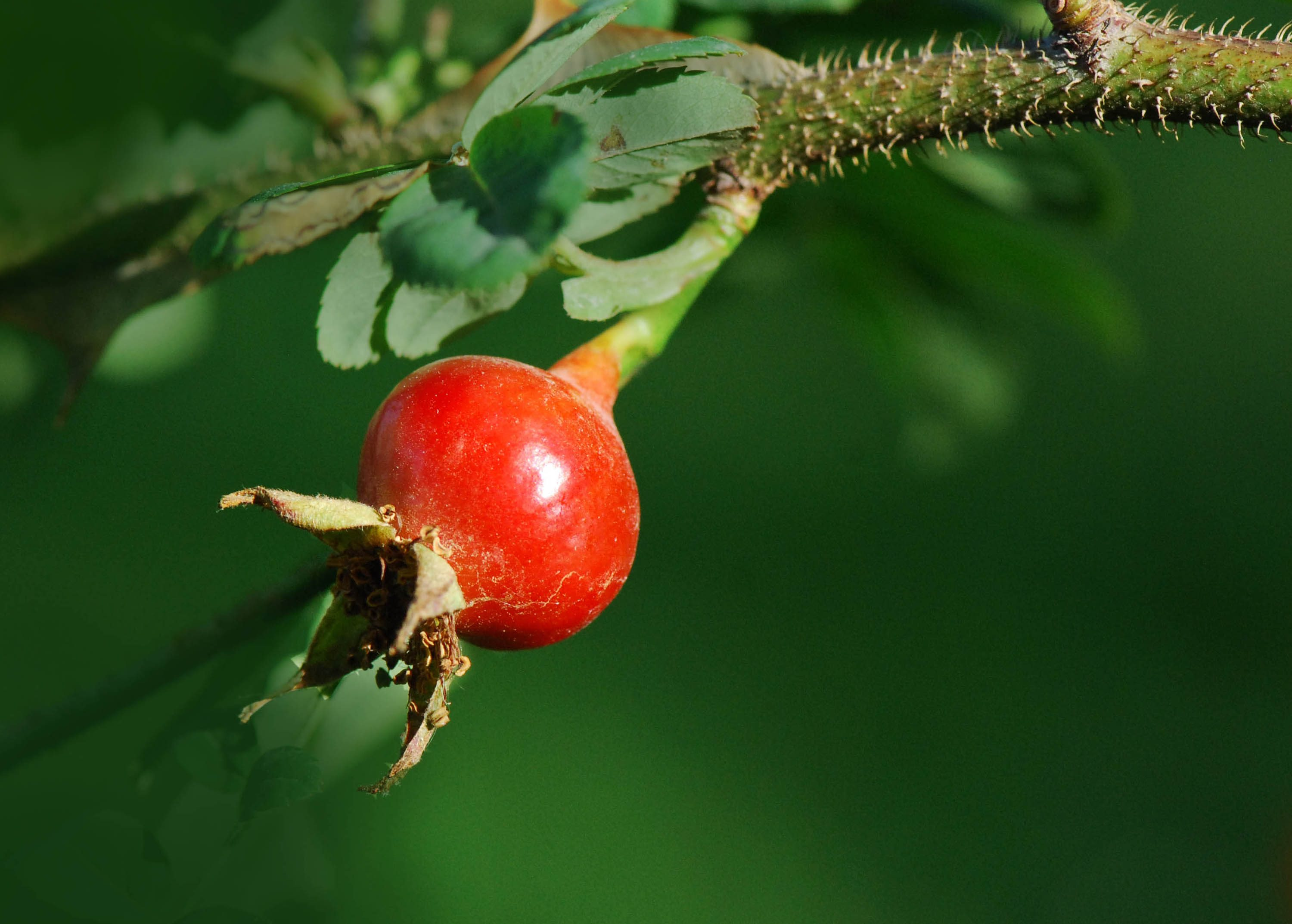 Rosa sericea, fruit, Jardin des Plantes de Paris